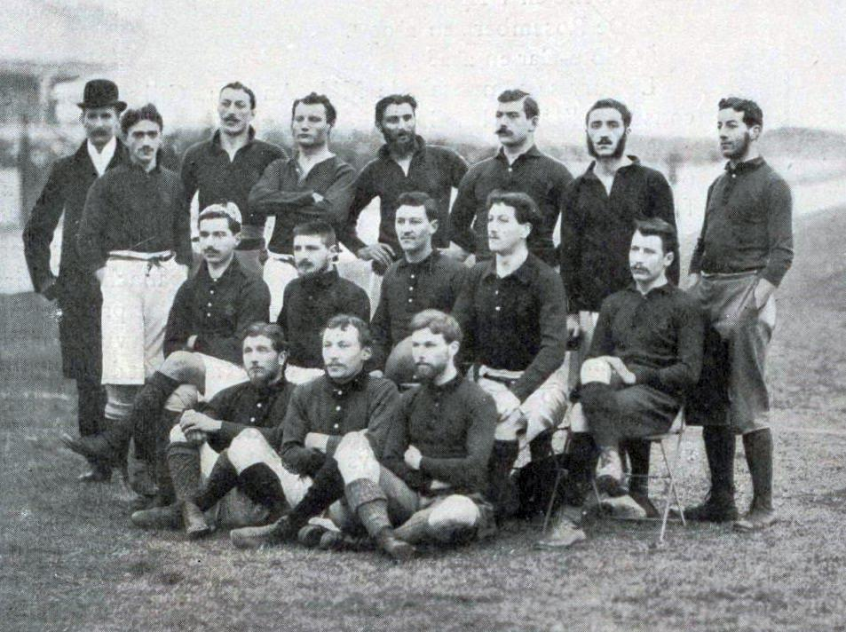 Le Stade français en février 1898